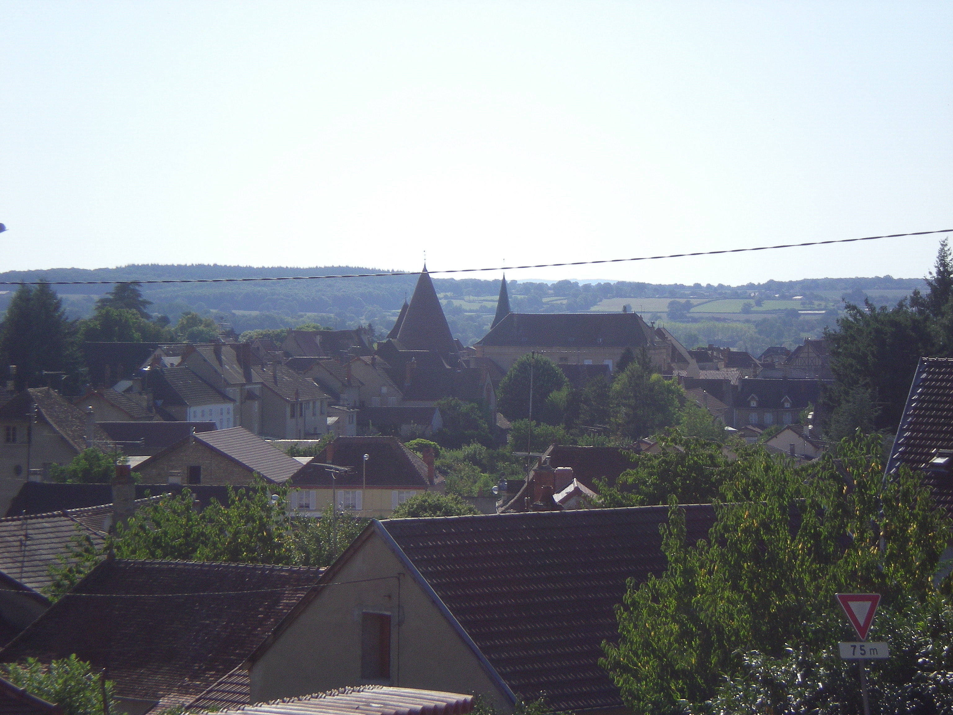 La ville de Marcigny